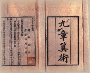 『九章算術』書影。